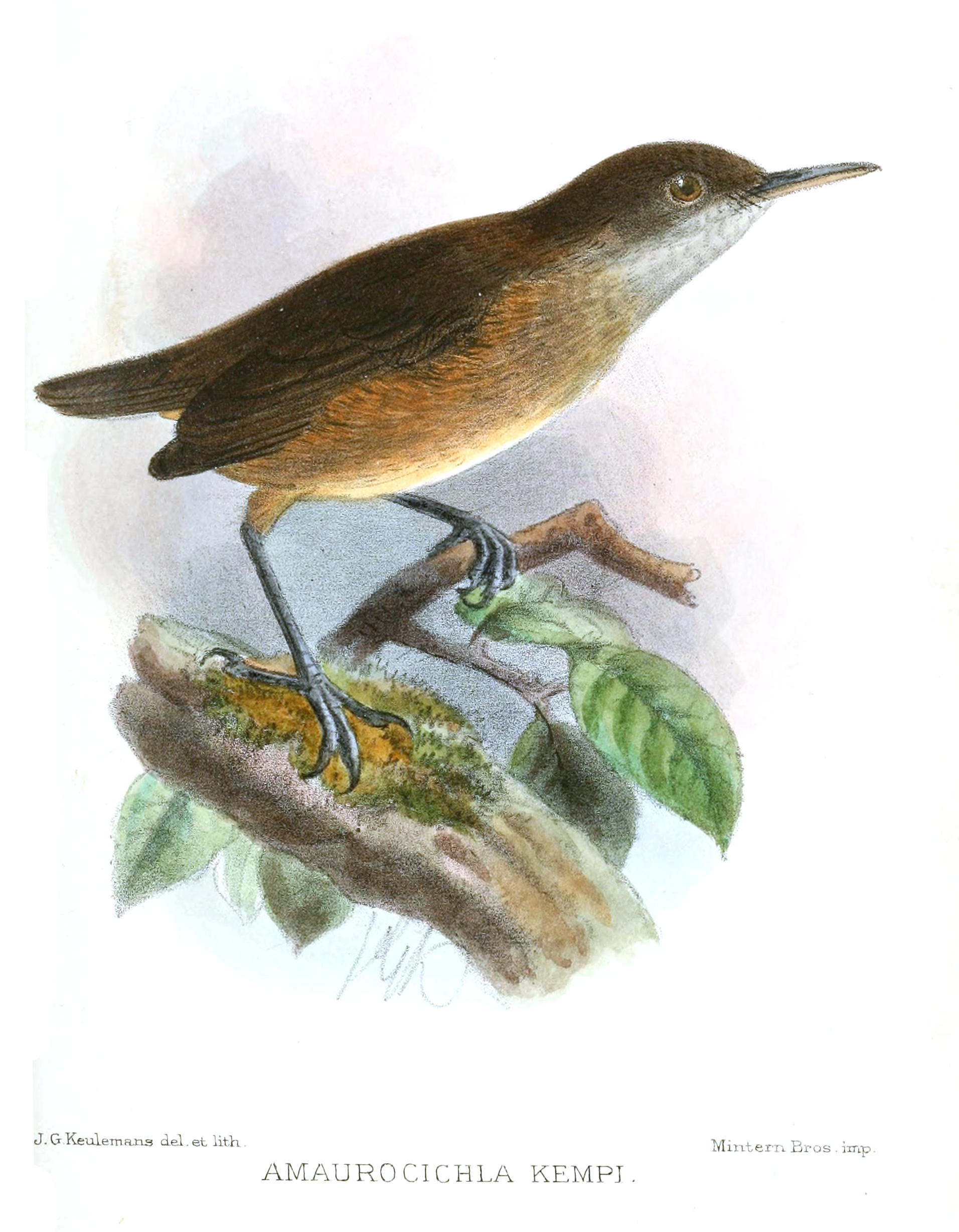 Amaurocichla kempi = Macrosphenus kempi